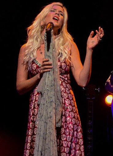 Stone in Brazil, 2018